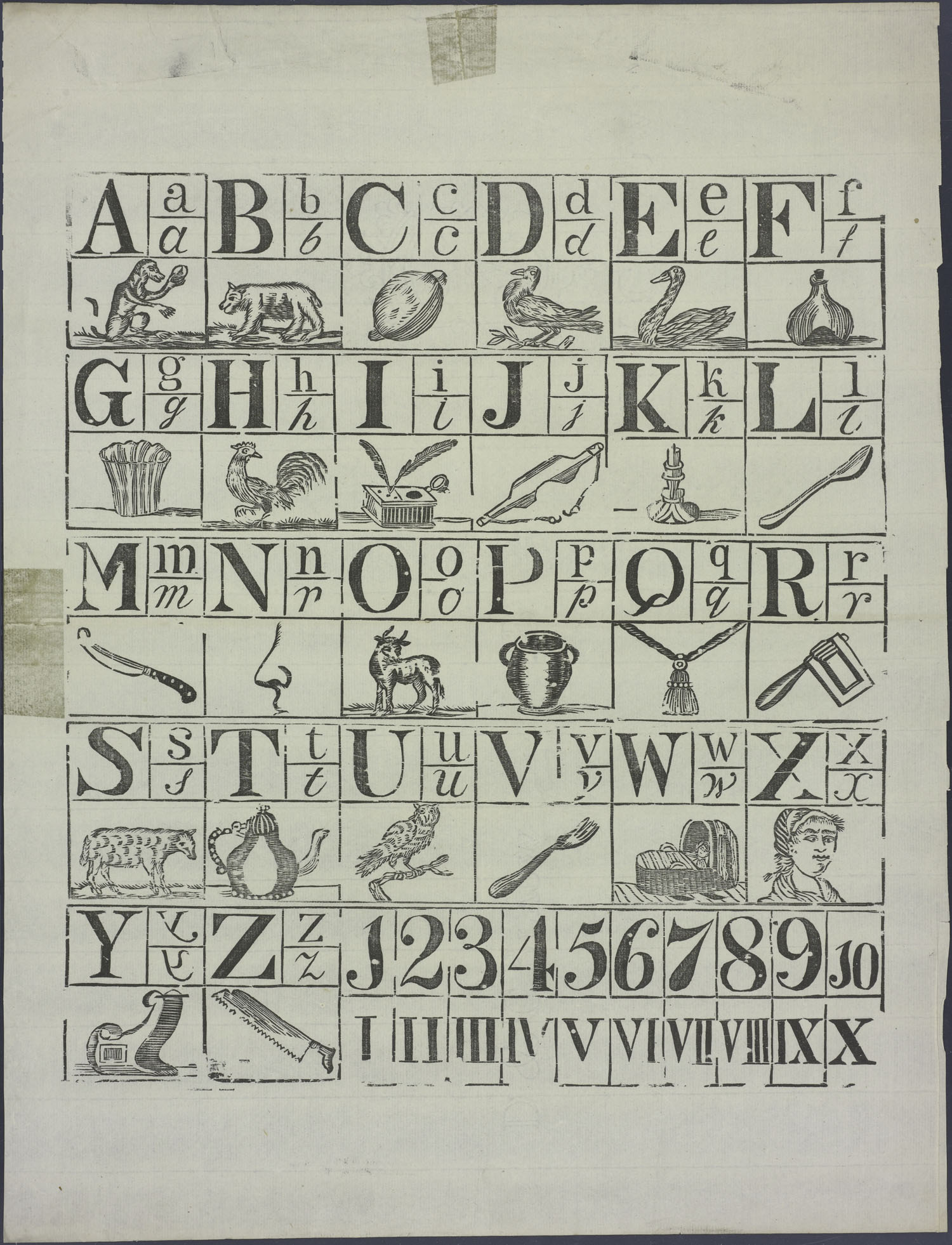 Abc-prent met 5 omkaderde houtsneden, met een alfabet met afbeeldingen, voorzien van een letter in kapitaal, een in onderkast en een schrijfletter: aap, beer, citroen, duif, eend, fles, glas, haan, inktpot, juk, kandelaar, lepel, mes, neus, os, pot, quast, ratel, schaap, theepot, uil, vork, wieg, Xantippe, ijsslee, zaag. Daarna volgen de cijfers 1-10 (arabisch en romeins).